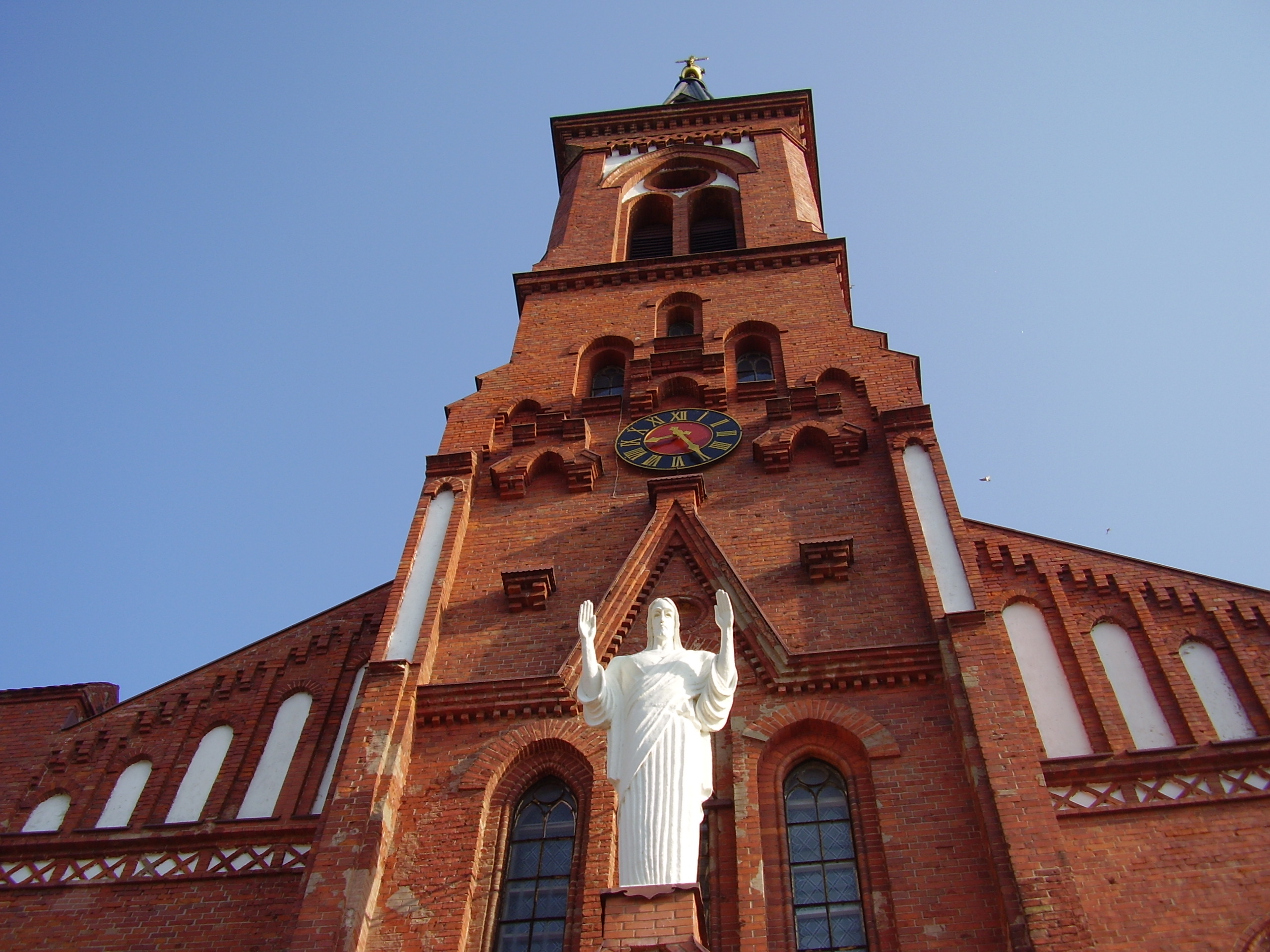 Беларуская (тарашкевіца): Касьцёл Сьв. Антонія Падуанскага. г. Паставы